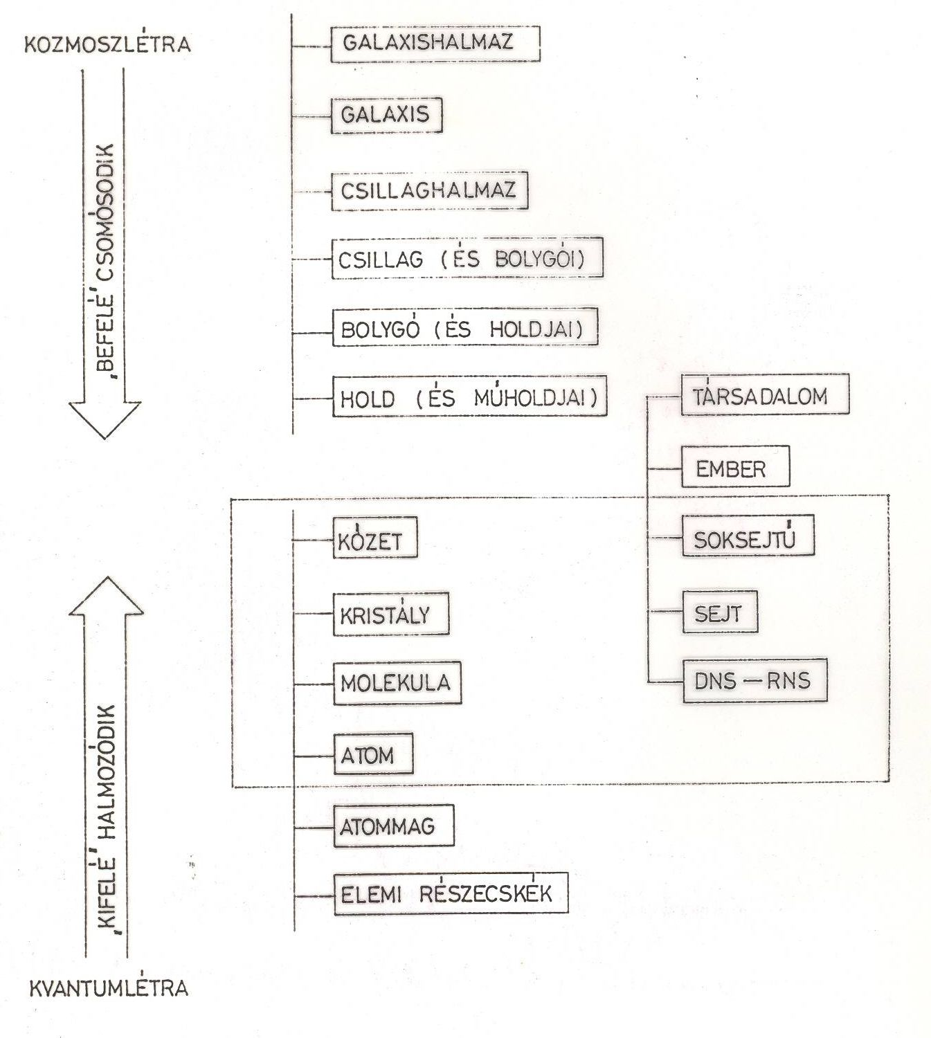 Az anyagfejlődés-történet hierarchia képbe rendezve